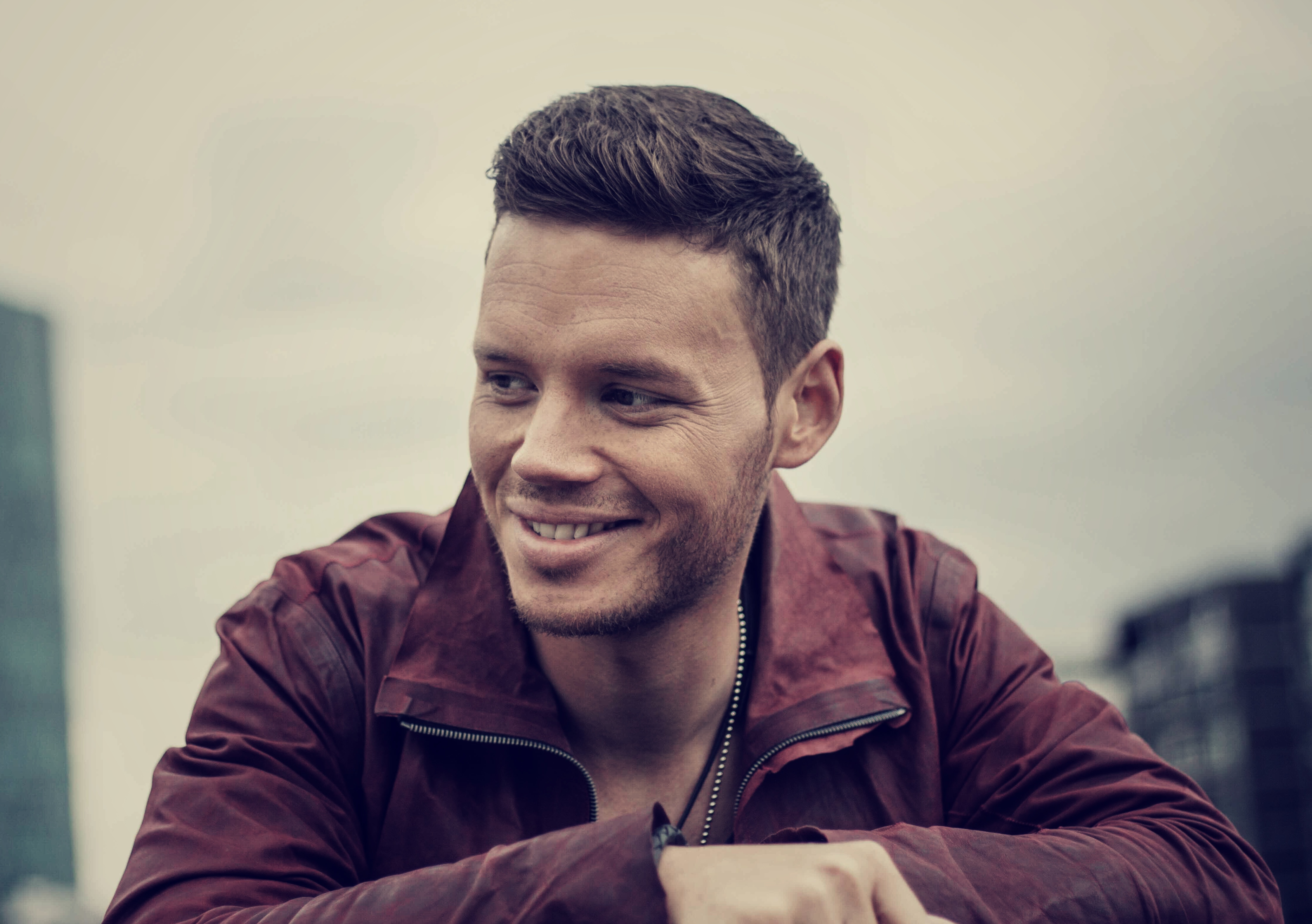 Johnny Schmitt alias Rockster